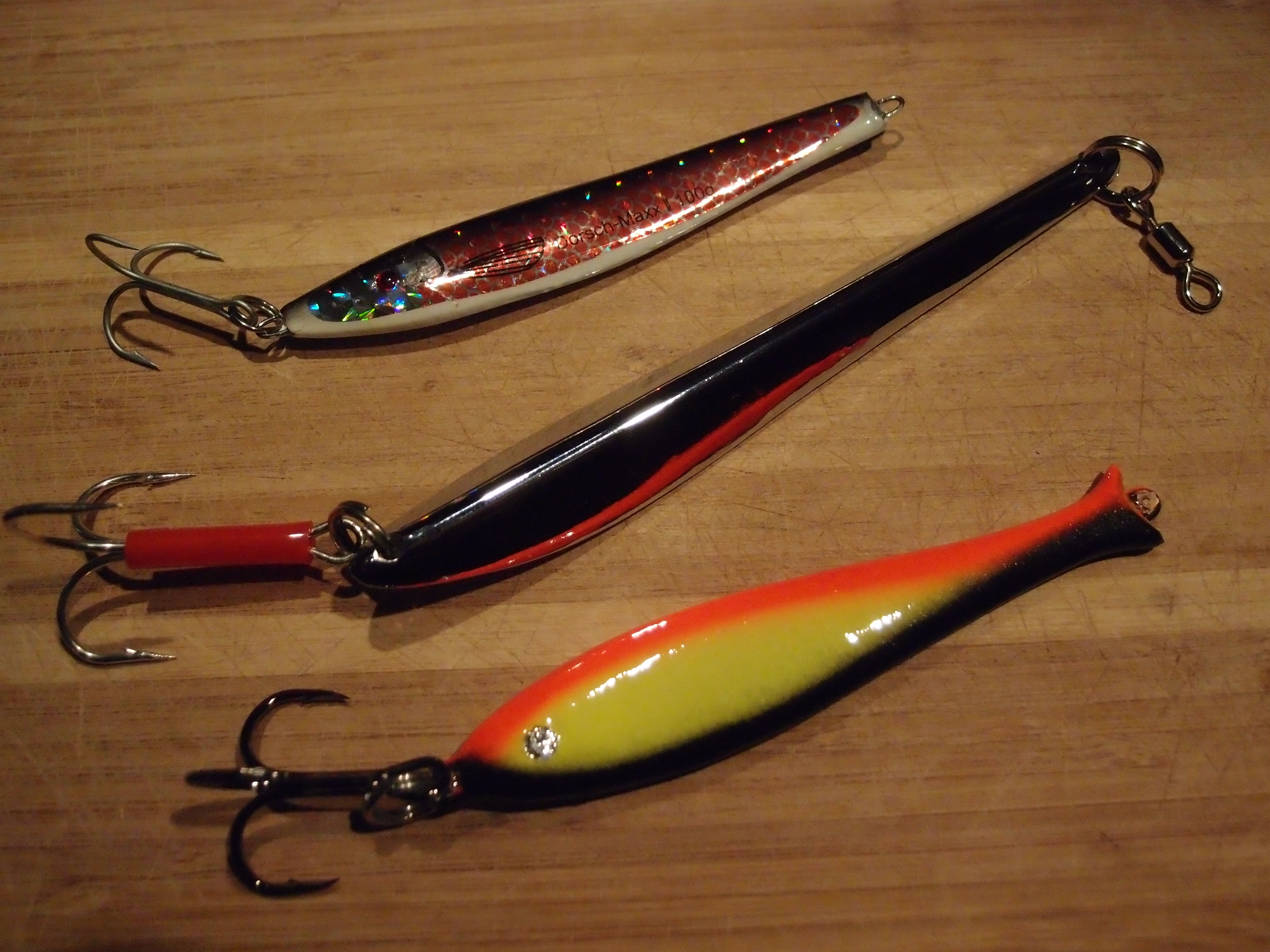 Pilker Datum: 05.08.2011 Urheber: M. Pfeiffer alias Benutzer:Gordito1869 Quelle: privates Fotoarchiv des Urhebers